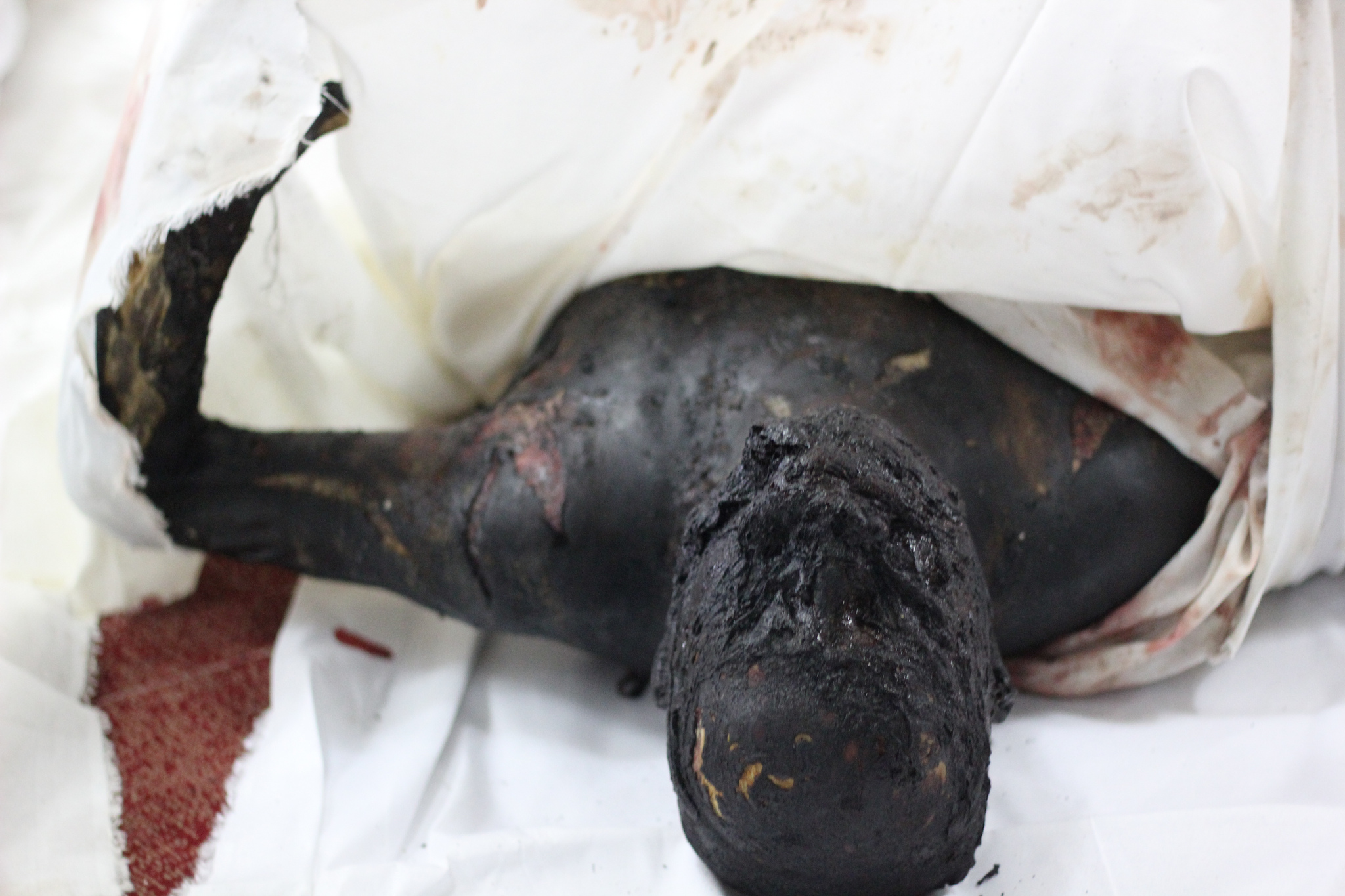 جثة محروقة في أحداث في أعتصام رابعة العدوية